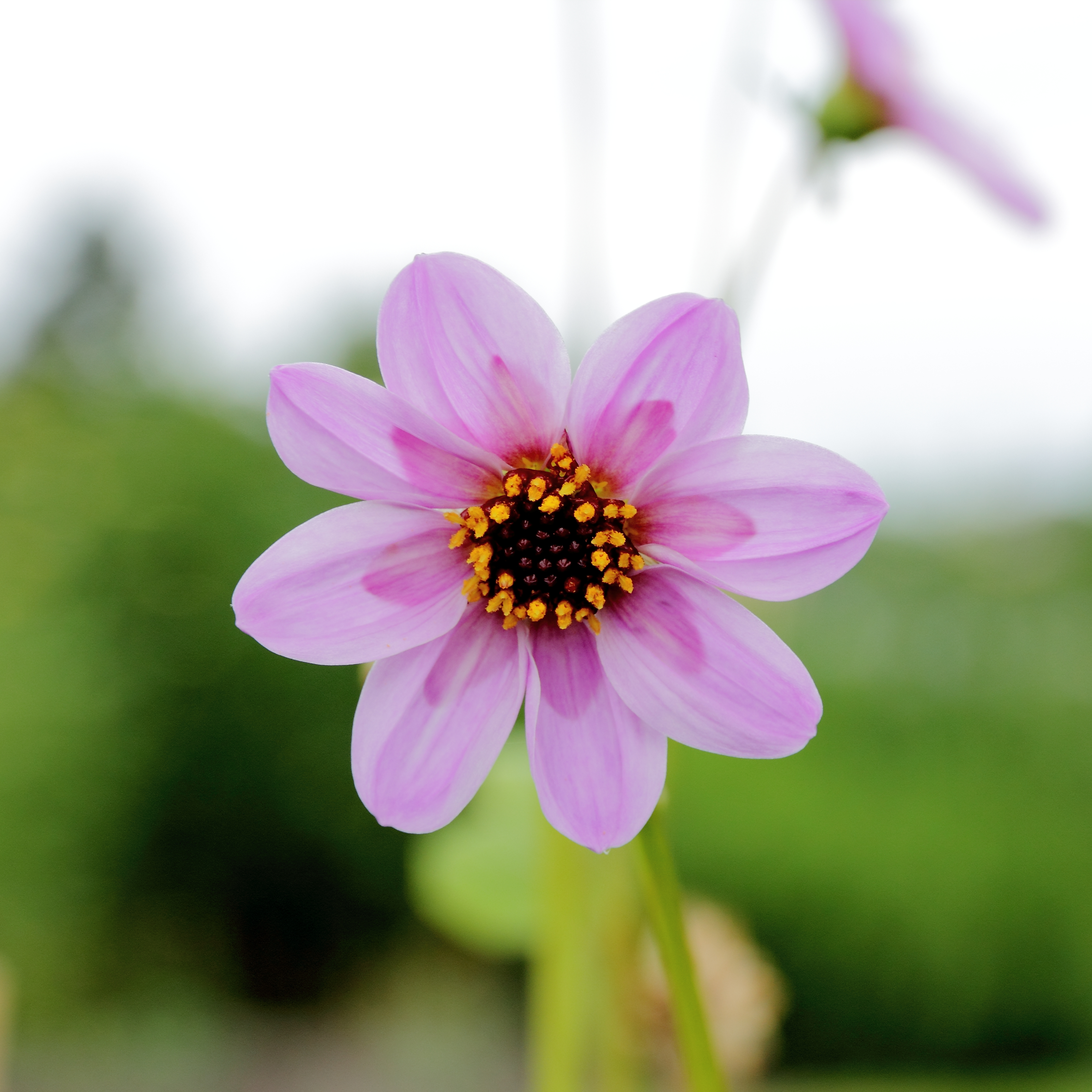 Dahlia merckii i Bergianska trädgården.